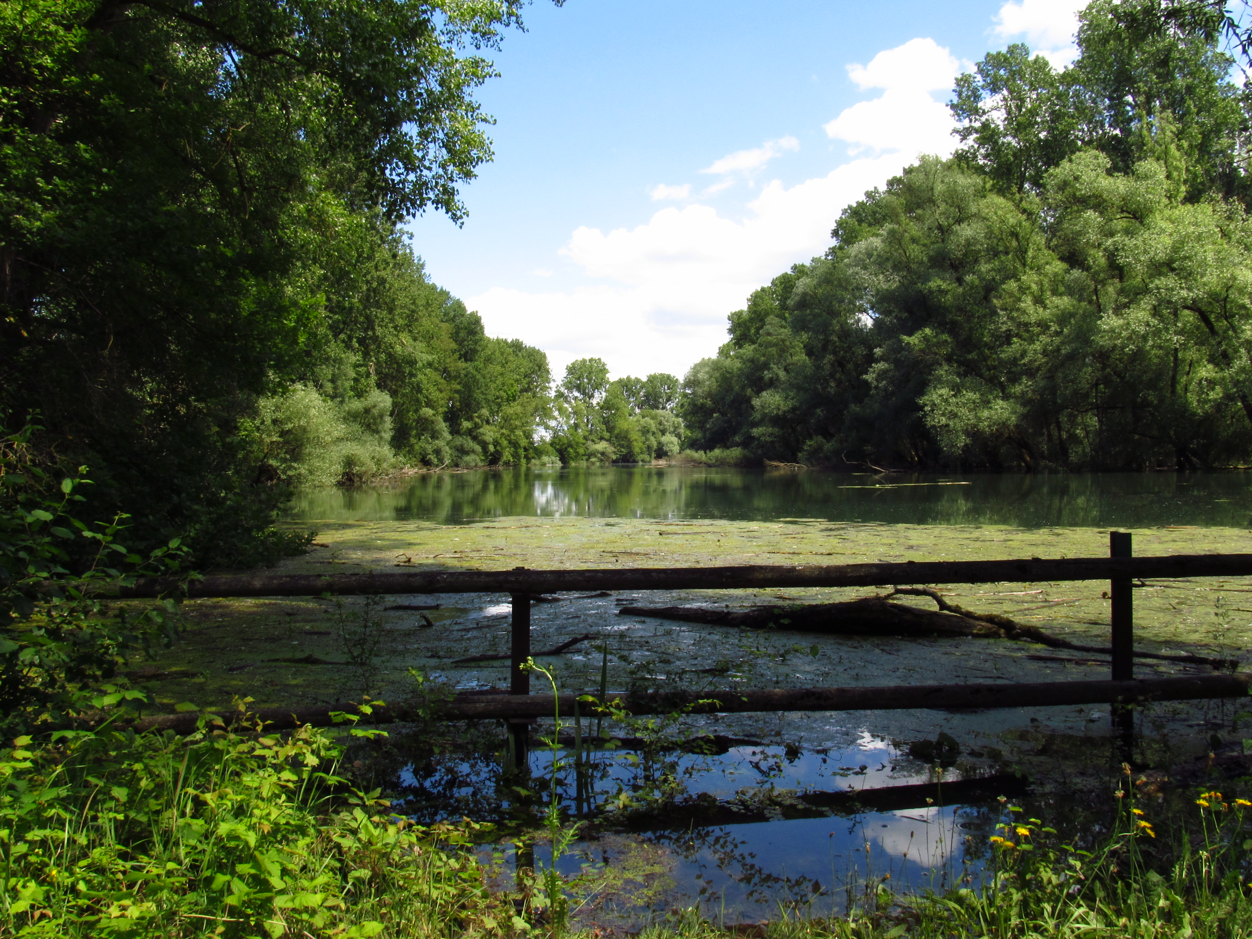 Altrheinarm im Naturschutzgebiet Goldgrund Standort N49.021812, E8.279088